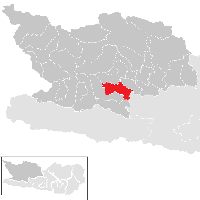 Karte von Kleblach-Lind im Bezirk Spittal an der Drau